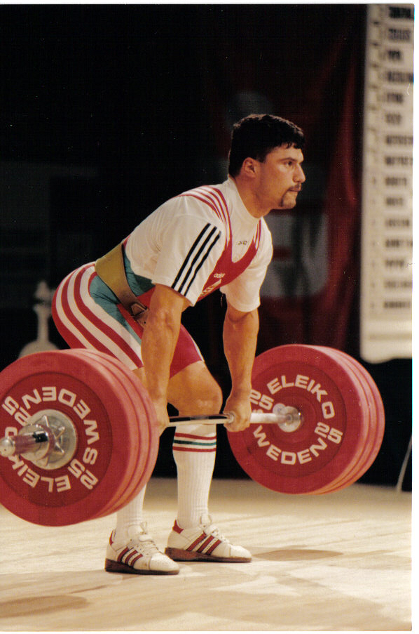 Adrian Popa, weightlifter born in Sibiu (Romania). He played for Hungary in the Summer Olympics in Atlanta where he finished 5th. Has earned a bronze medal at the European Championships in Rijeka in 1997. Currently lives in Bucharest.